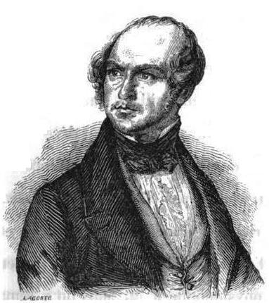 Odilon Barrot